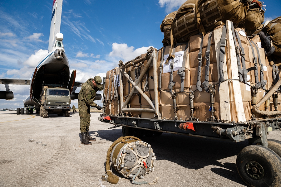 Будни ВКС РФ на авиабазе Химеймим в Сирии